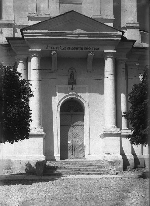 Беларуская (тарашкевіца): Пінск (Pinsk), вуліца Дамініканская (vulica Daminikanskaja). Касьцёл Сьвятога Дамініка